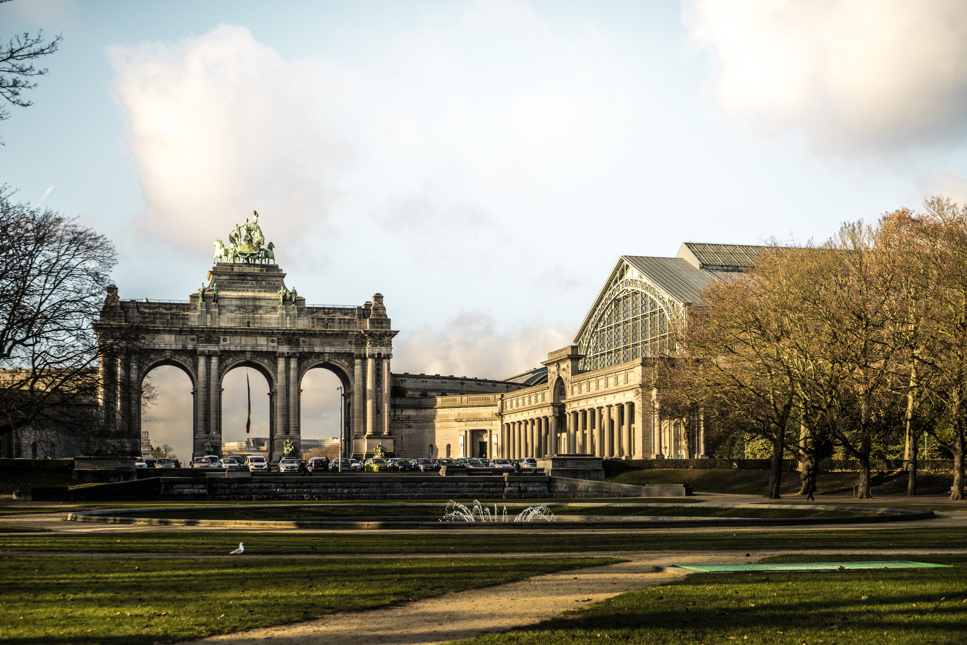 Parc du Cinquantenaire, avec l'arche du cinquantenaire en fond.